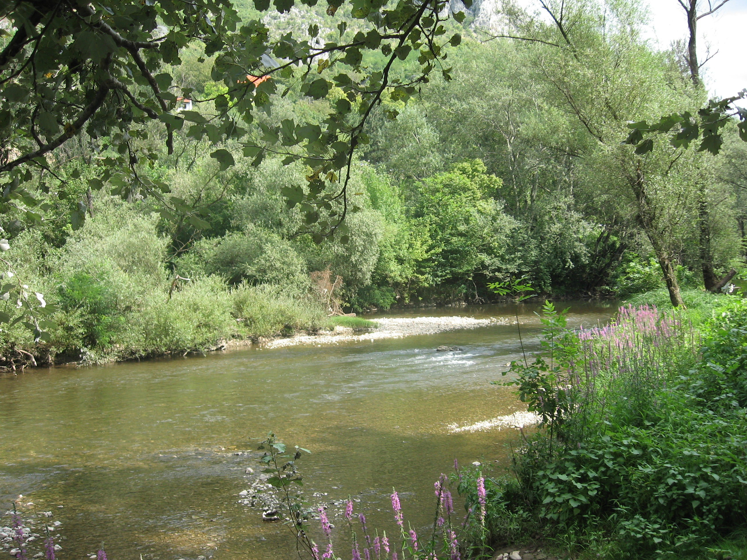 Део тока Нишаве кроз Сићевачку клисуру